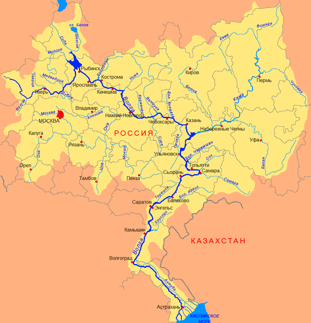 Схема бассейна Волги